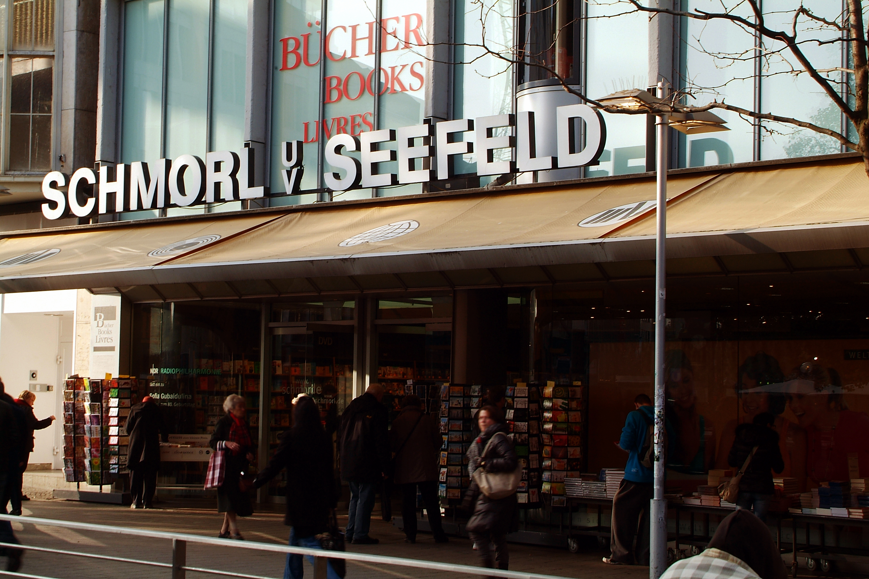 Bücherberge zum Stöbern (und Kaufen) vor dem Haupteingang der Buch- und Medienhandlung Schmorl und von Seefeld, Bahnhofstraße 14 in Hannover ...